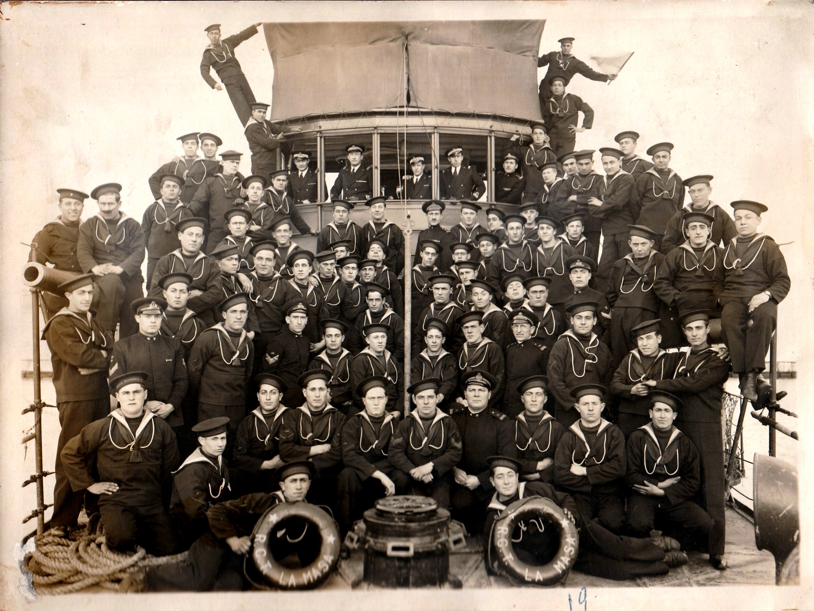 Foto di gruppo dell'equipaggio del regio cacciatorpediniere Giuseppe La Masa